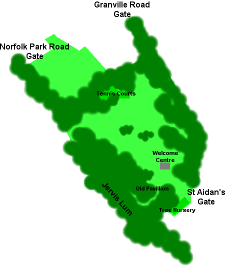 Norfolk Park plan, Sheffield.